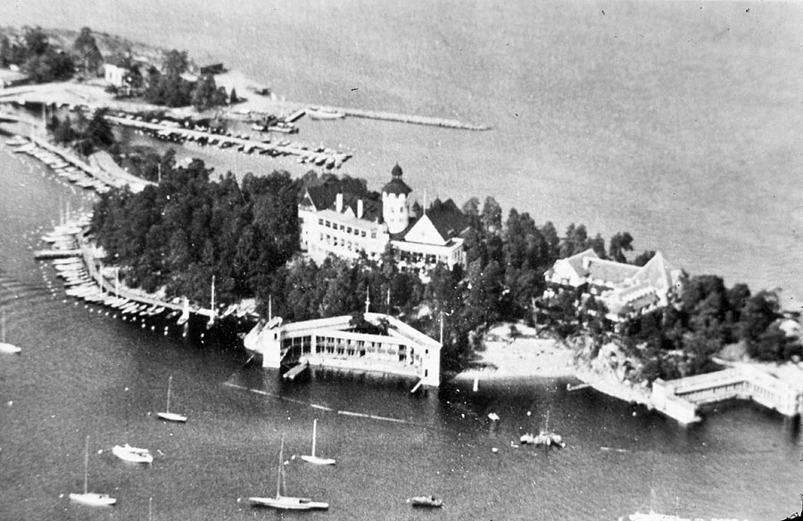 Restaurangholmen. Flygfoto. Holmen. Två badhus. Dalaröbryggan med pir.